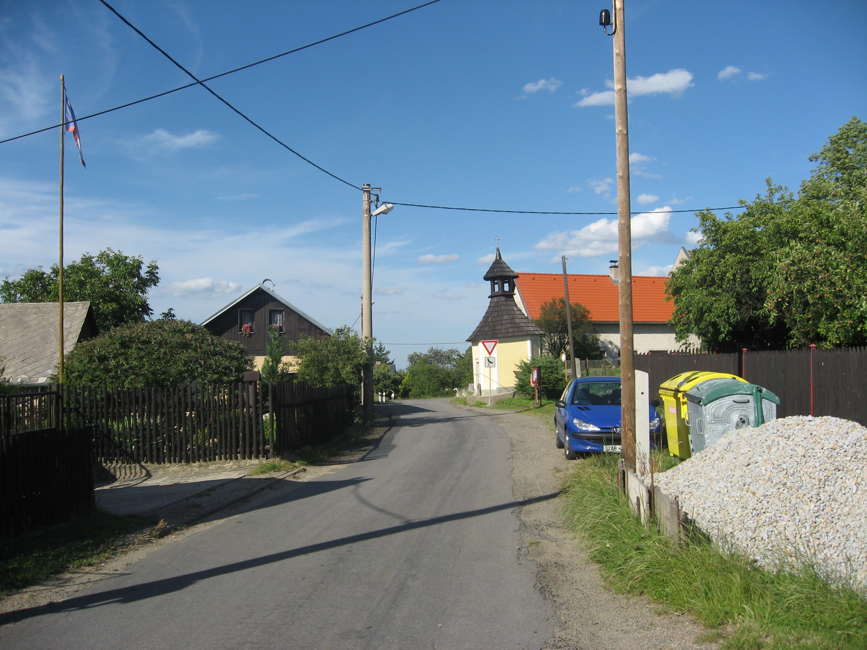 Velešov